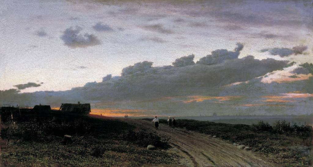 Клодт М.К. Вечерний вид в деревне. Орловская губерния. 1874, холст, масло, 58х106